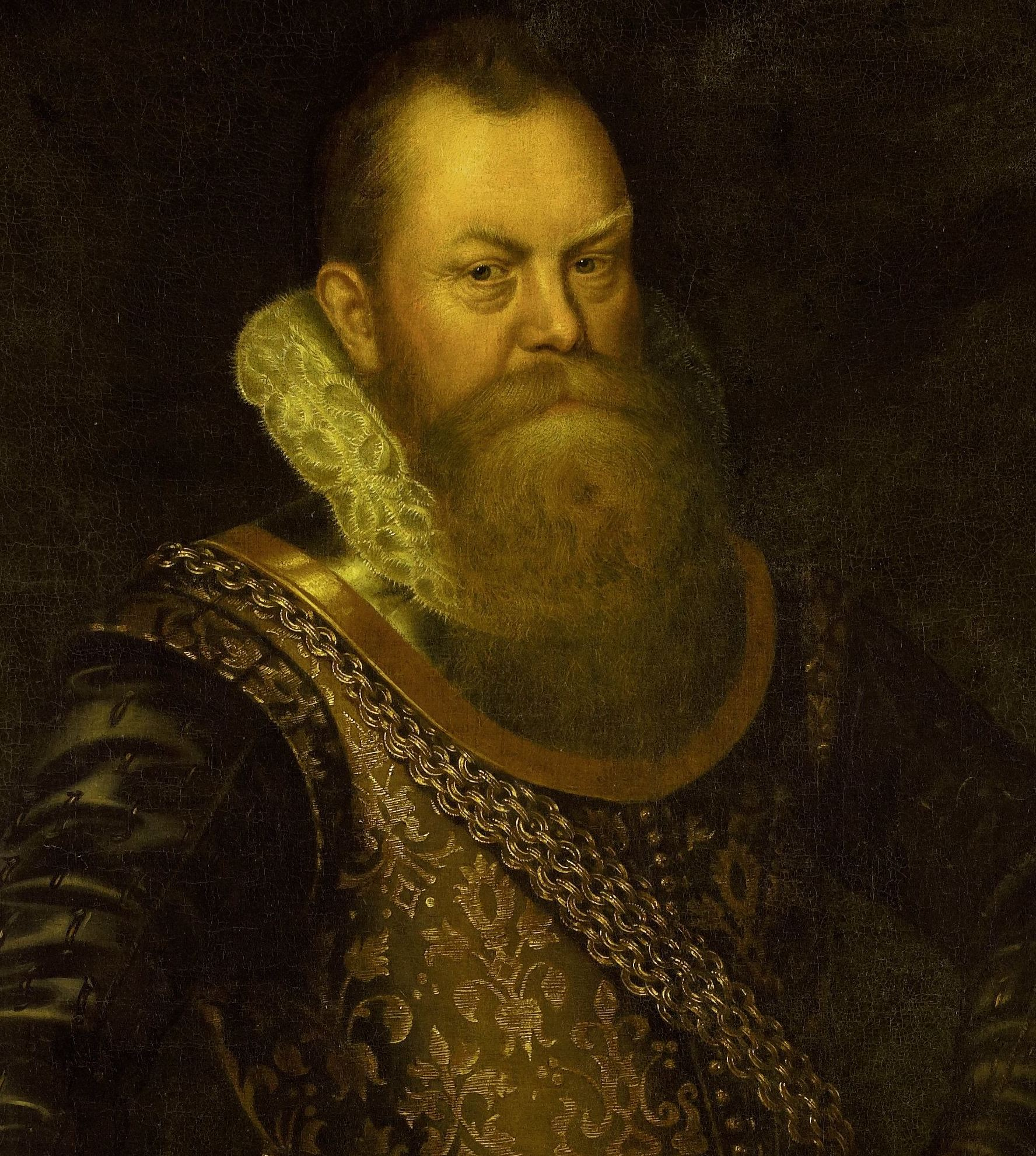 Portret van Frederik Houtman (1571-1627), gouverneur van Ambon. Kniestuk, staande naar rechts, een degen aan een ceintuur om de middel, stok in de rechterhand, de linkerhand in de zij. Rechts een tafel waarop een globe staat.